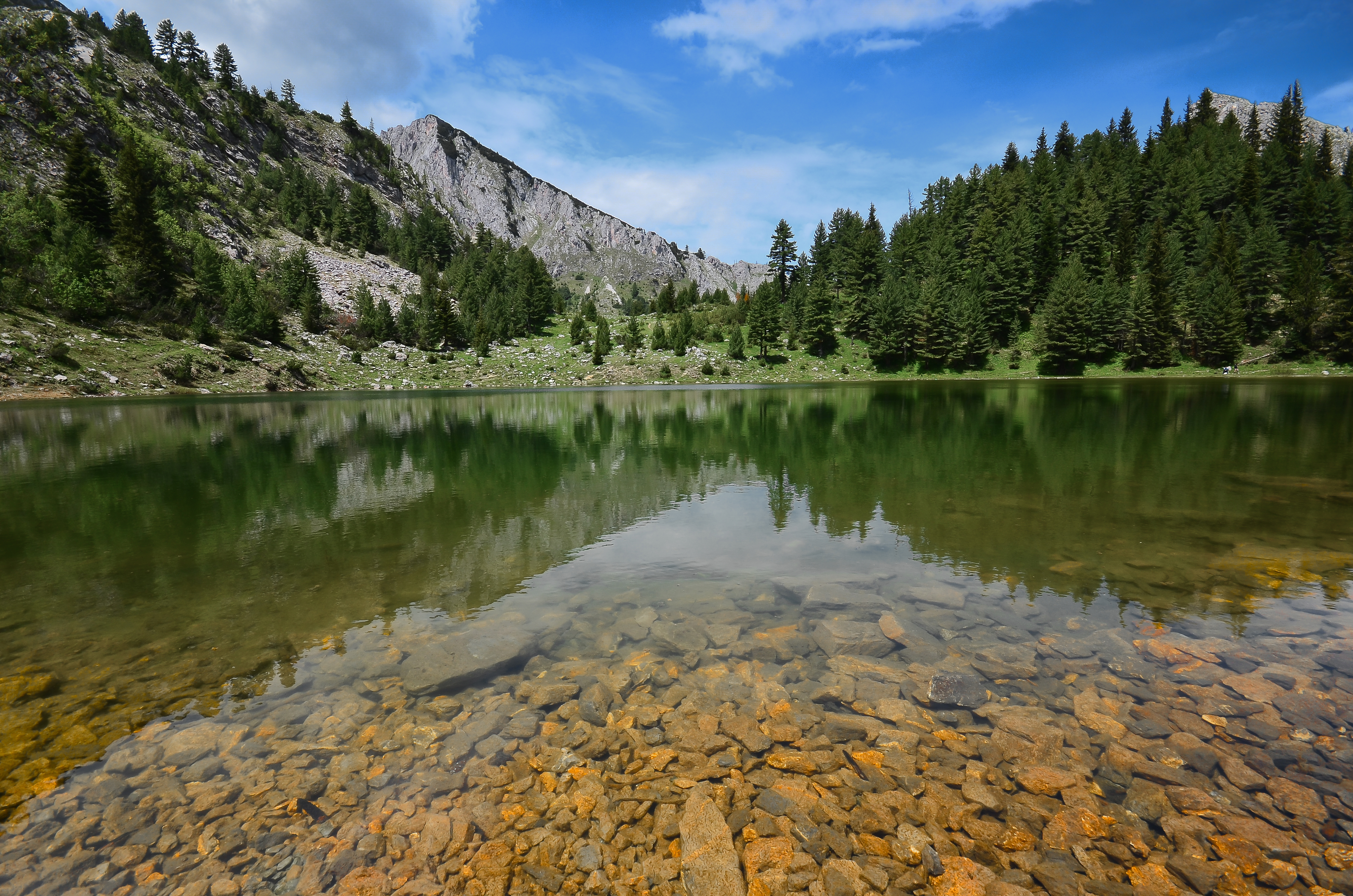 Parku Kombëtar Bjeshkët Nemuna, Pejë, Deçan, Istog, Junik, Gjakovë